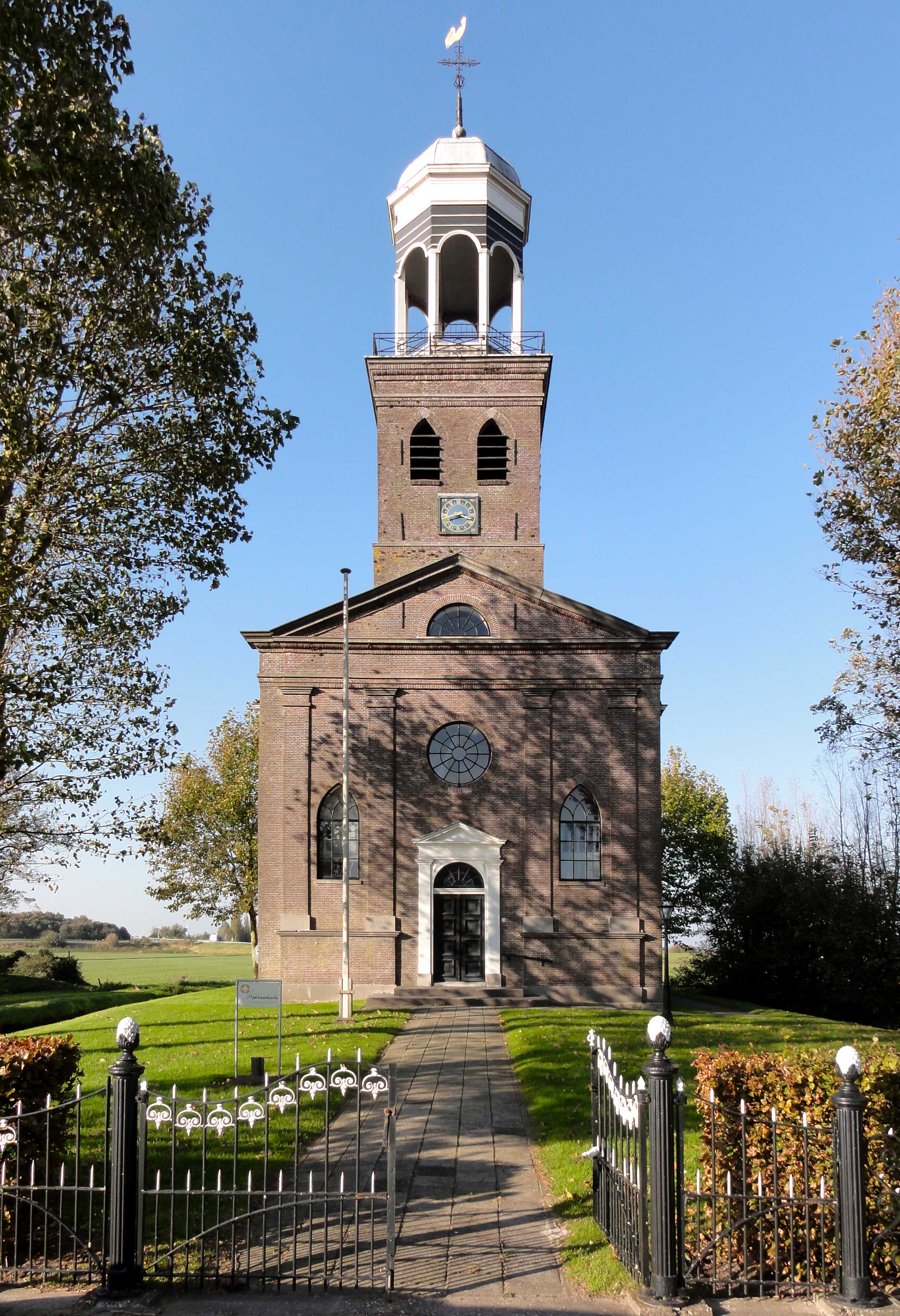 Kerk van Oosterzee (Buren 29)